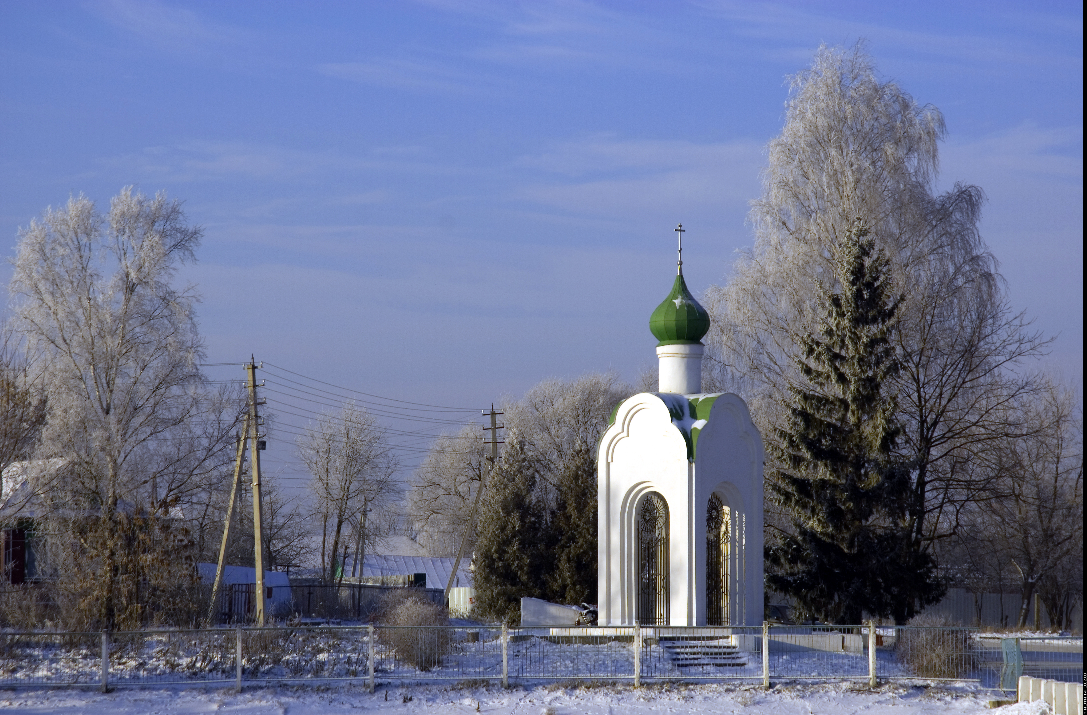 27/12/2008, Зима в деревне Колонтаево. Георгиевская часовня; Георгия Великомученика часовня